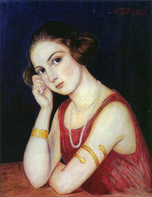 Porträtt av Dardels hustru, Thora